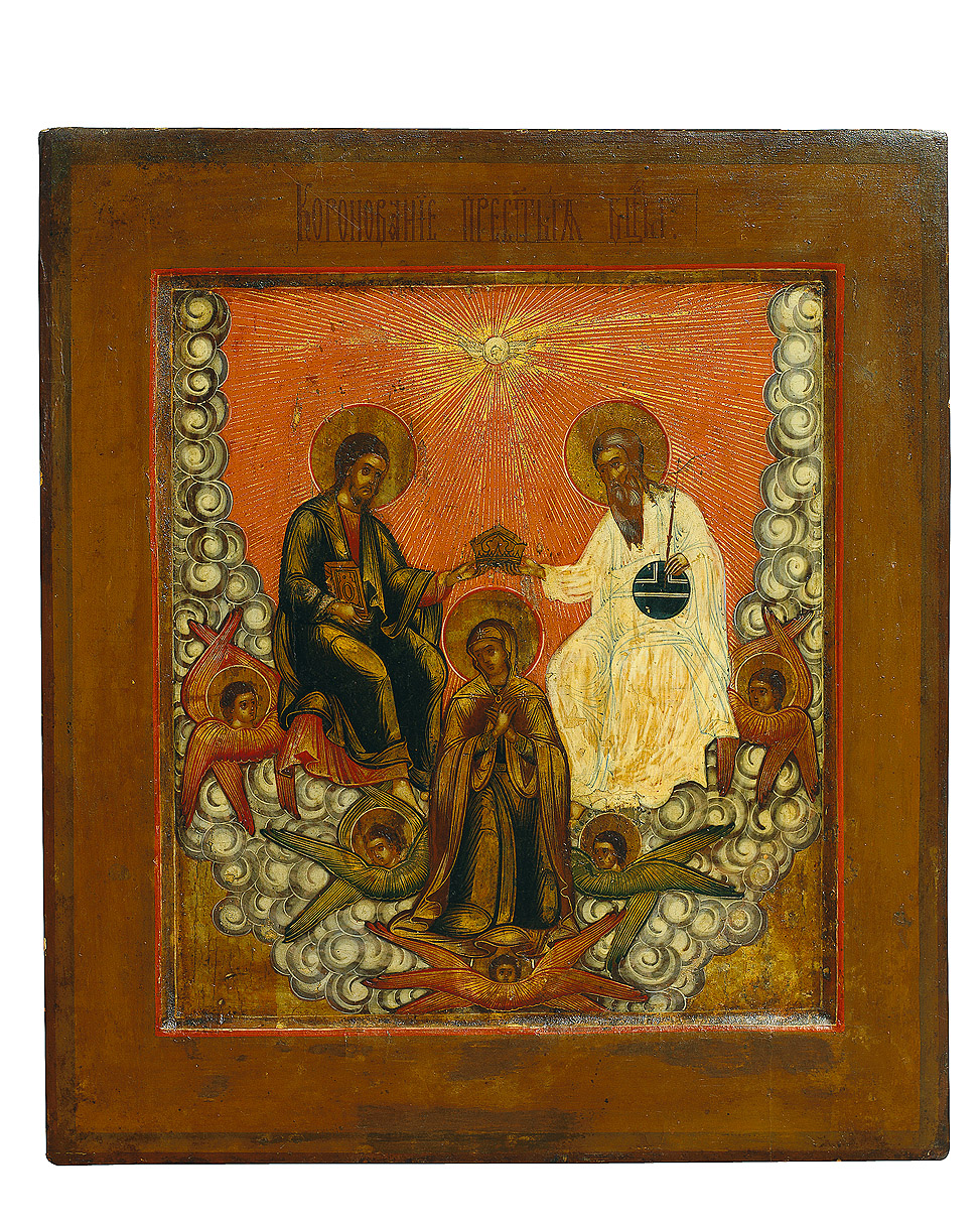 КОРОНОВАНИЕ БОГОРОДИЦЫ Русский Север, ок. 1860. Дерево, левкас, темпера 35 x 31 см. Частное cобрание